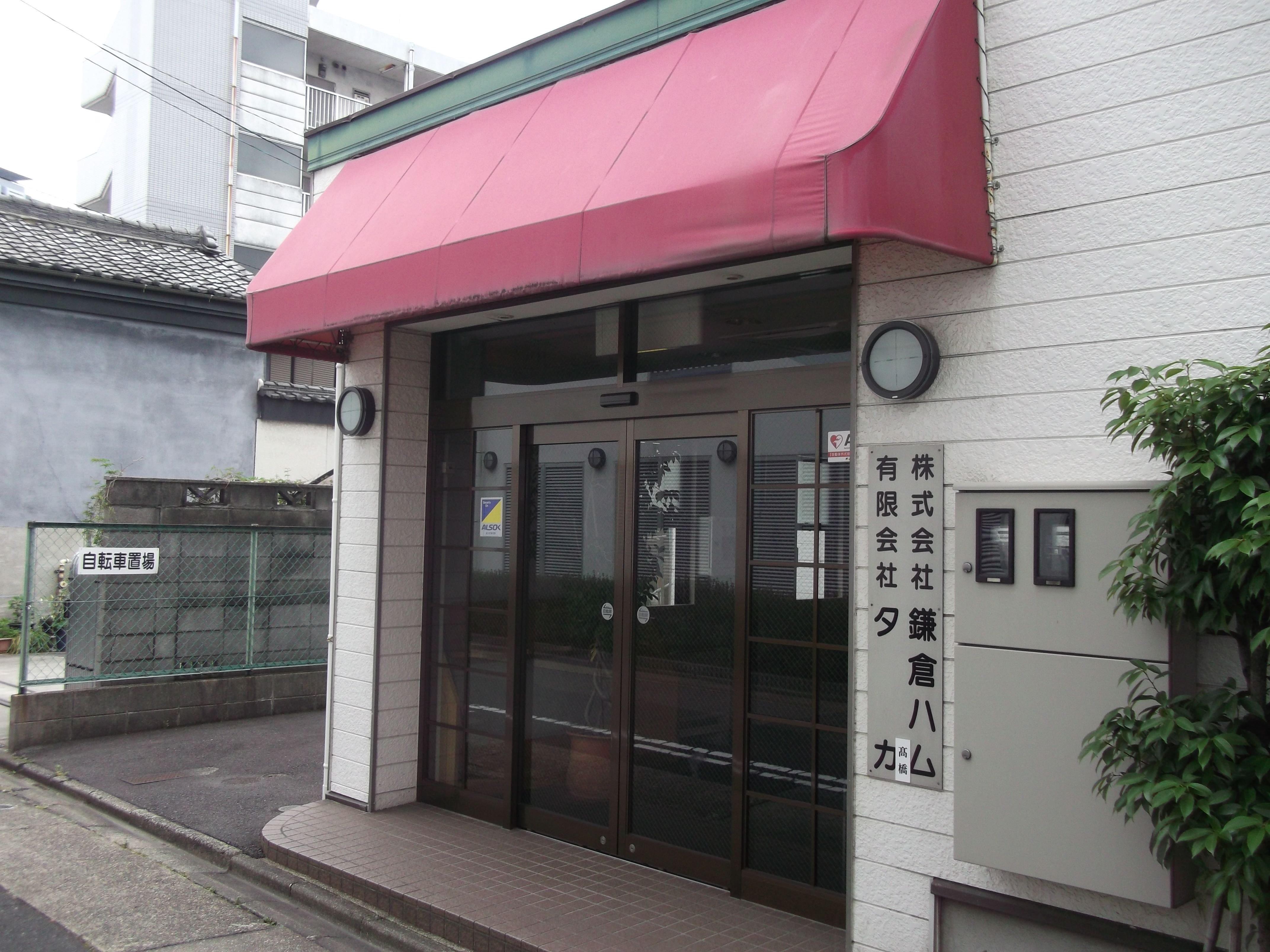 名古屋市中村区にある星S印で知られる鎌倉ハム本社を北側公道西側より写す